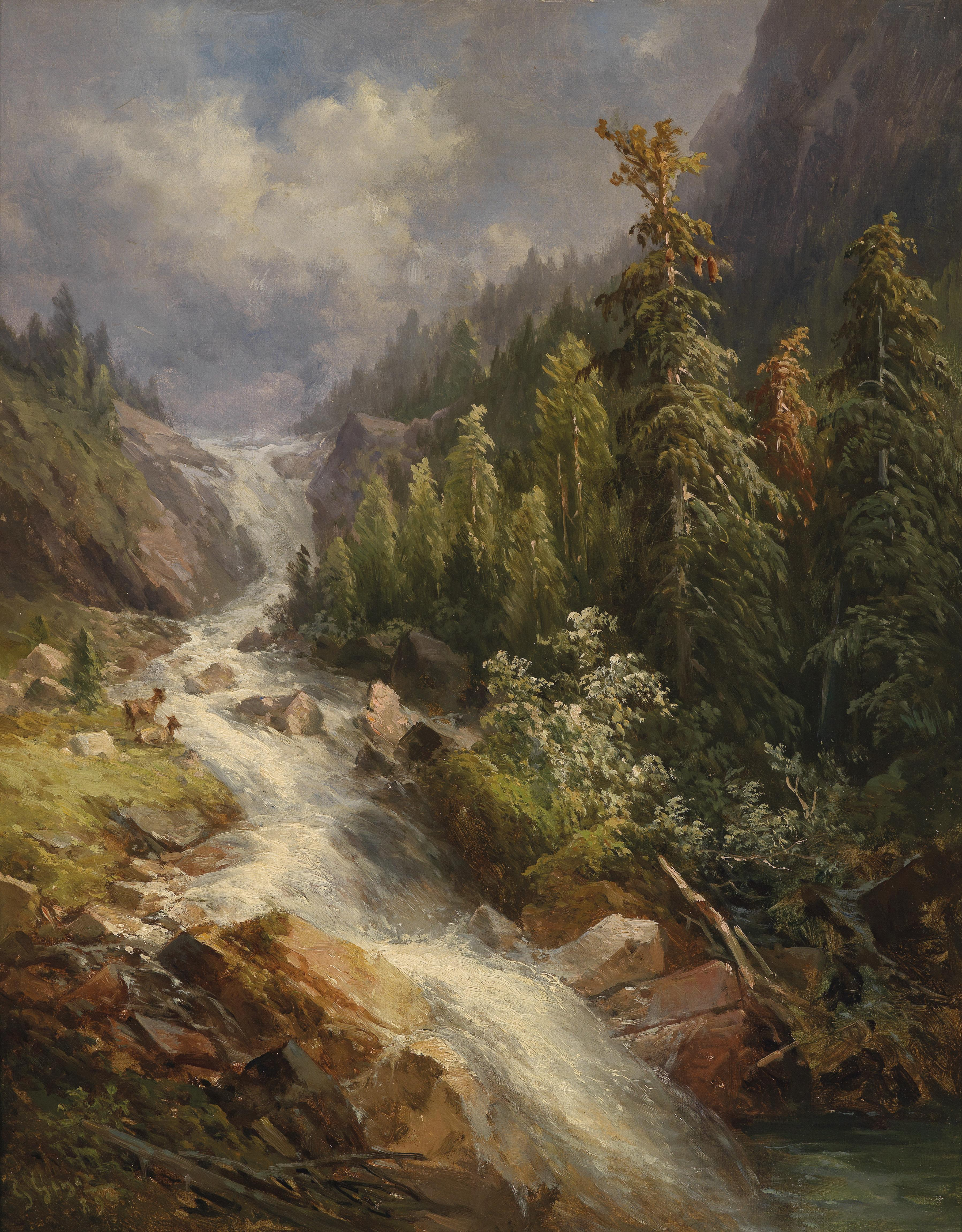 Stalbachfall am Grundlsee Steyamark